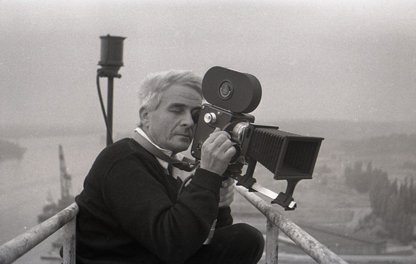 Witold filmuje wodowanie w Stoczni Szczecińskiej - 1960r